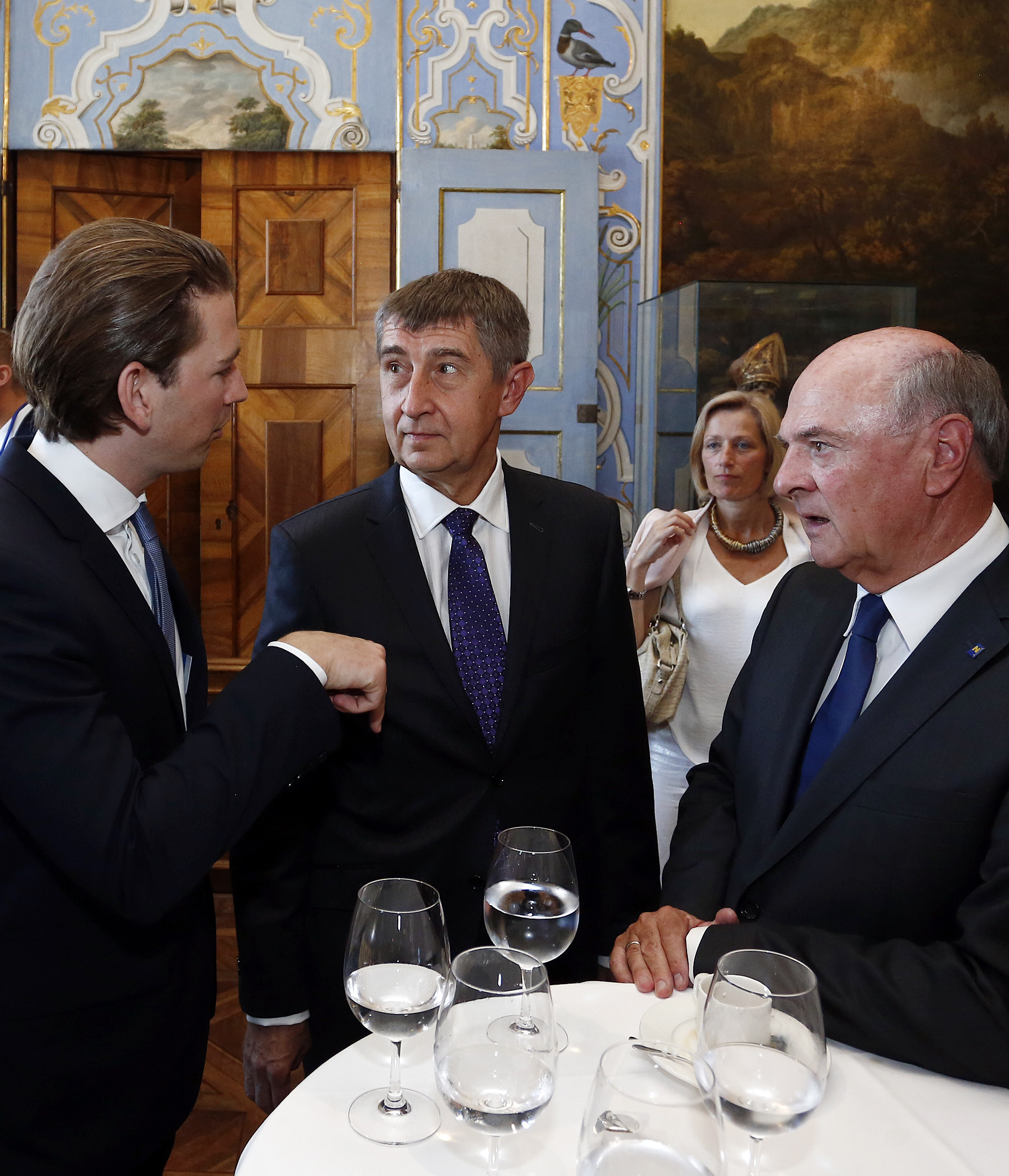 Europa-Forum Wachau 2015